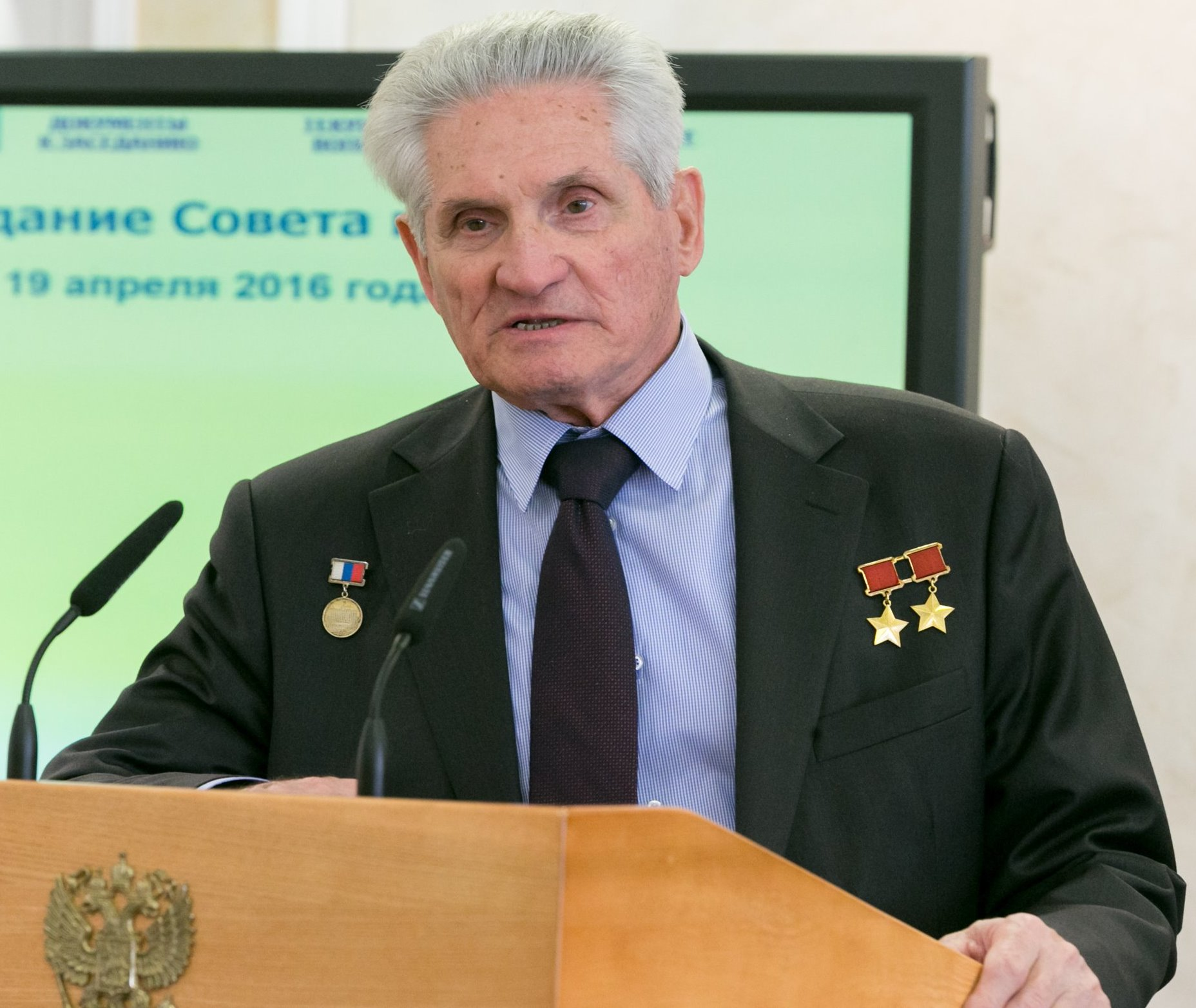 Борис Валентинович Волынов (род. 1934) — лётчик-космонавт СССР